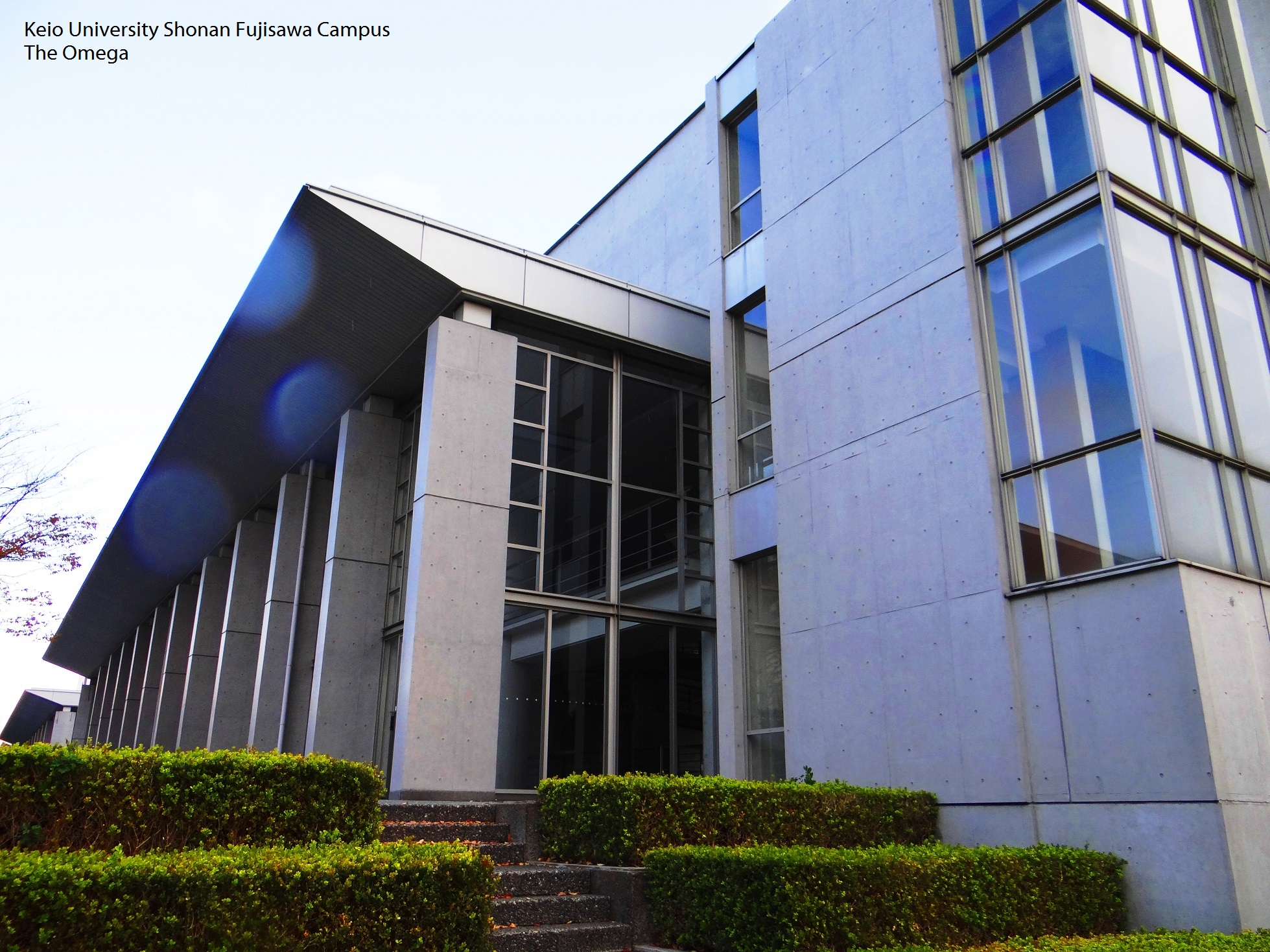 Keio University SFC Omega(West)